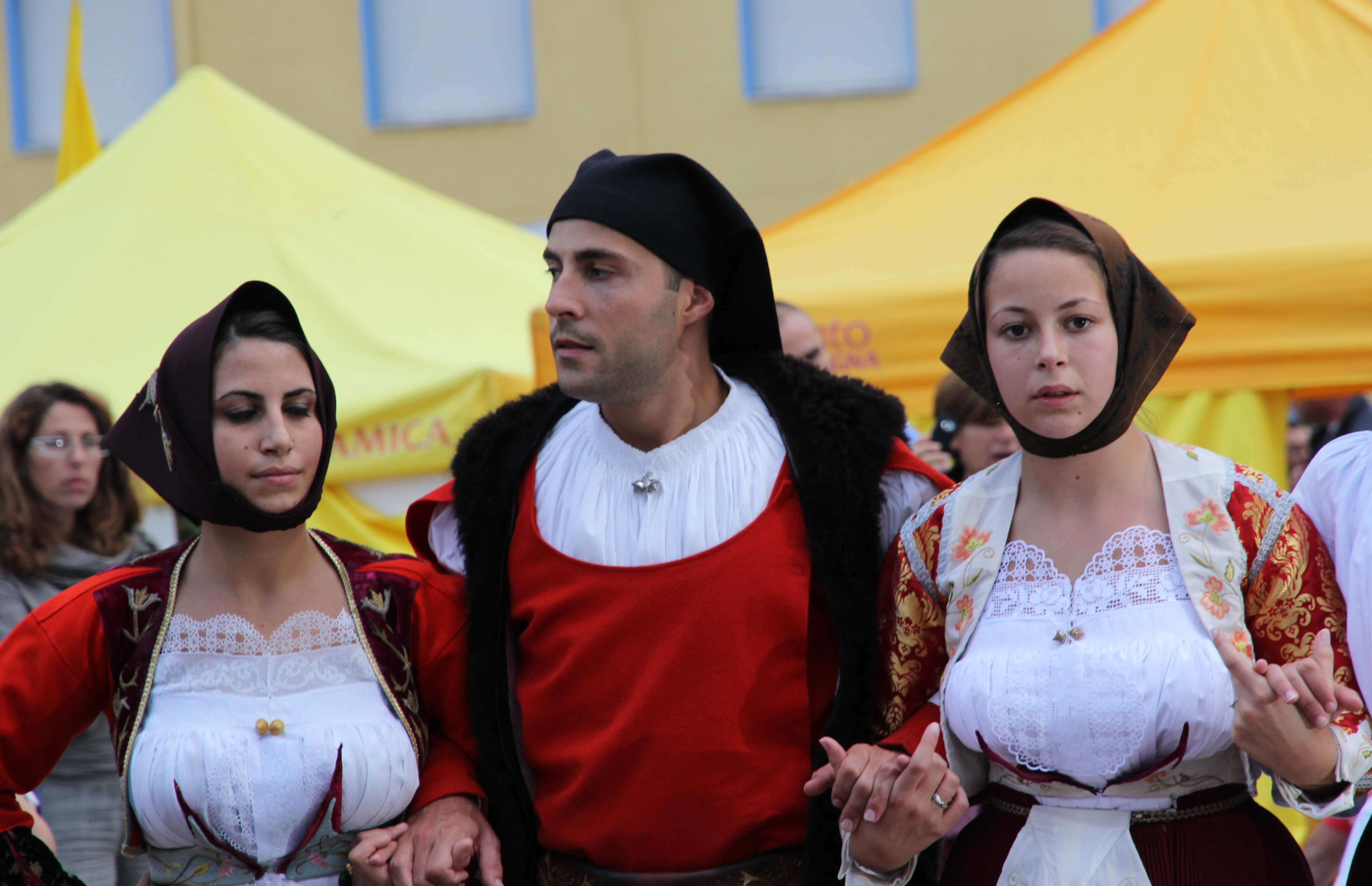 Costume tradizionale di Fonni